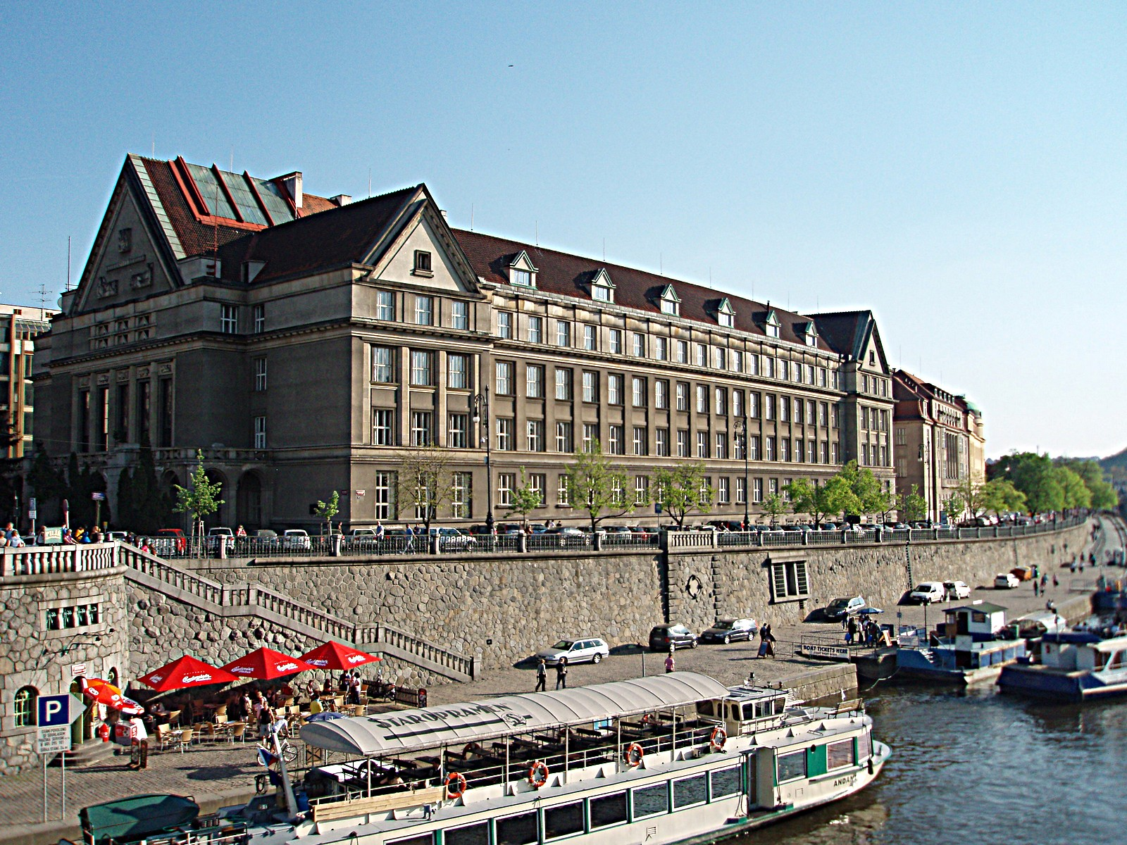 Univerzita Karlova v Praze Právnická fakulta